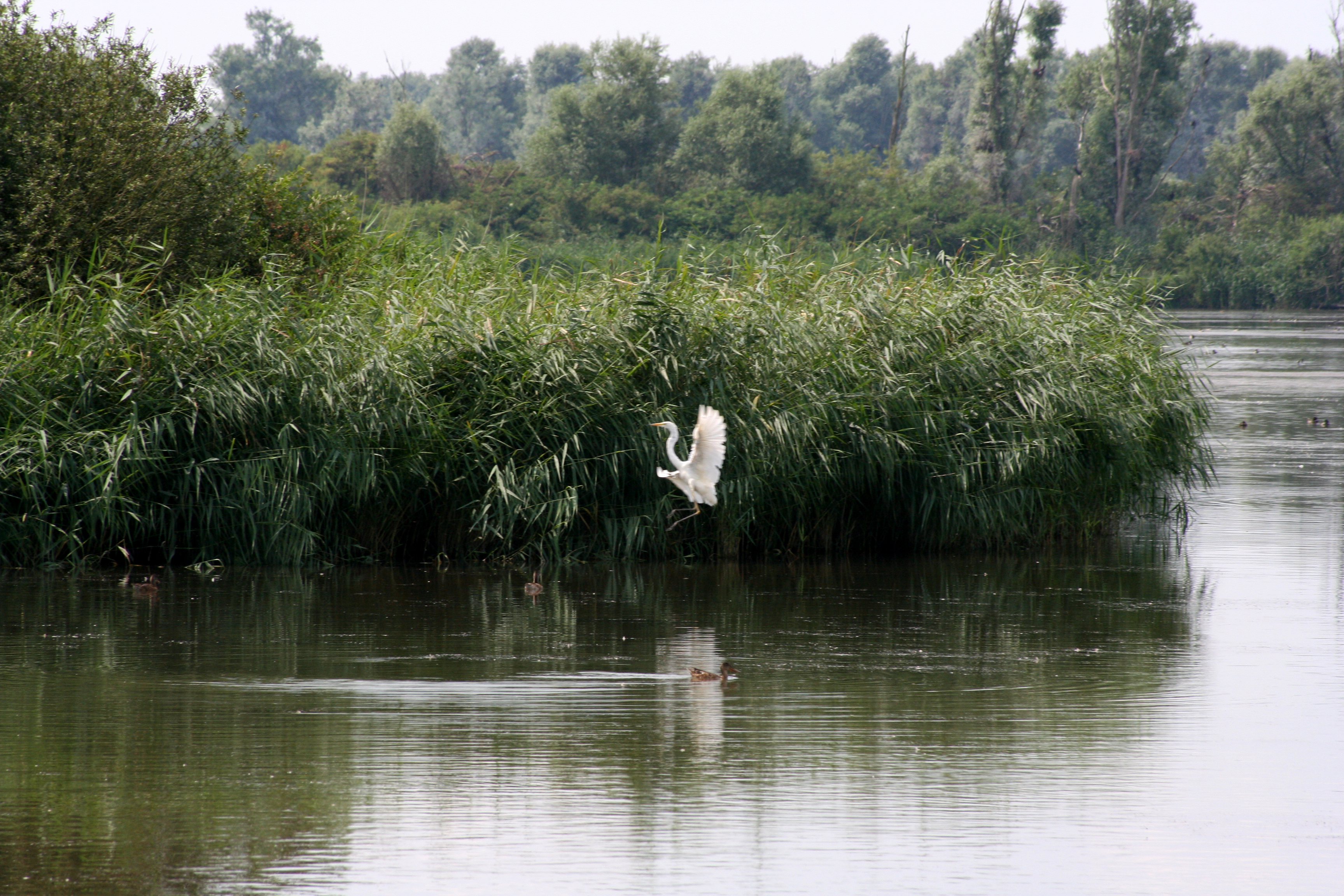 Lepelaarplassen, landing witte reiger